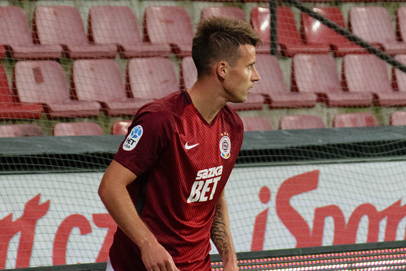 Lukáš Mareček